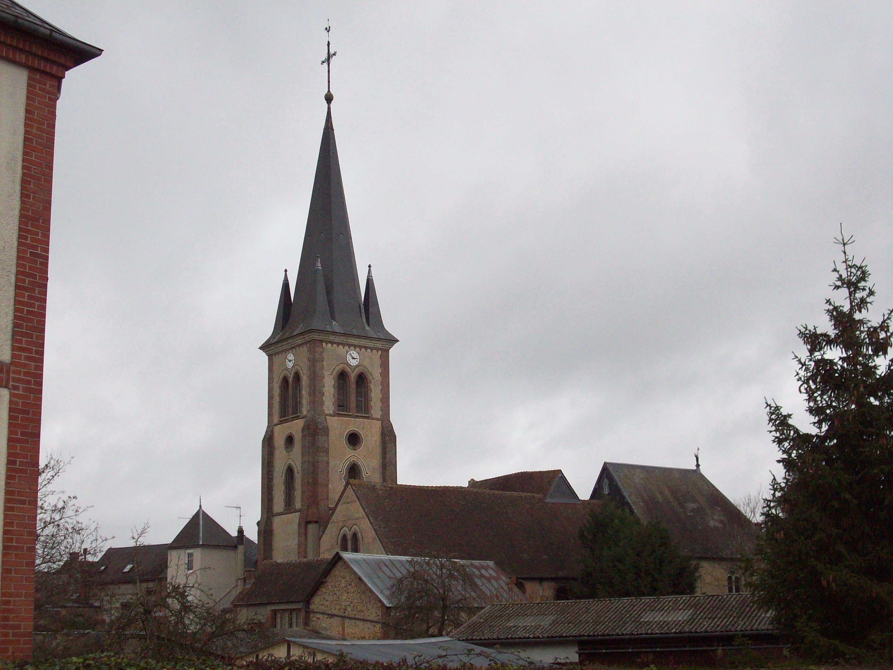 Église Saint-Just de Bourth.